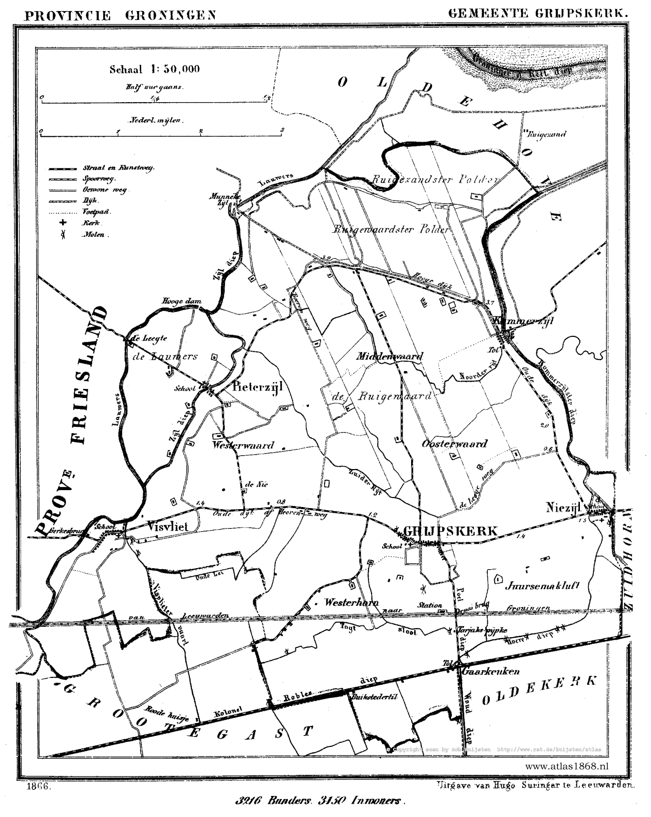 Kaart van Grijpskerk uit Gemeente Atlas van Nederland, J. Kuyper 1865-1870, Uitgave Hugo Suringar Leeuwarden.